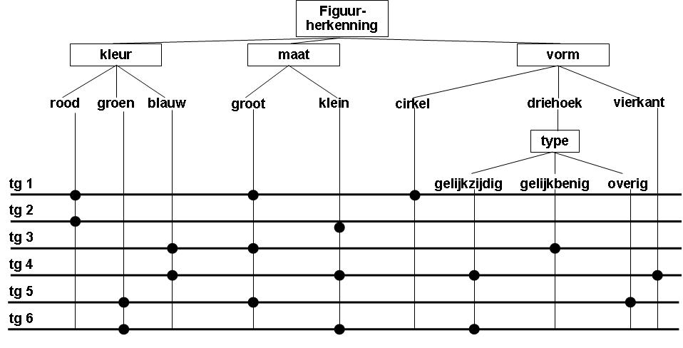 Classificatieboom